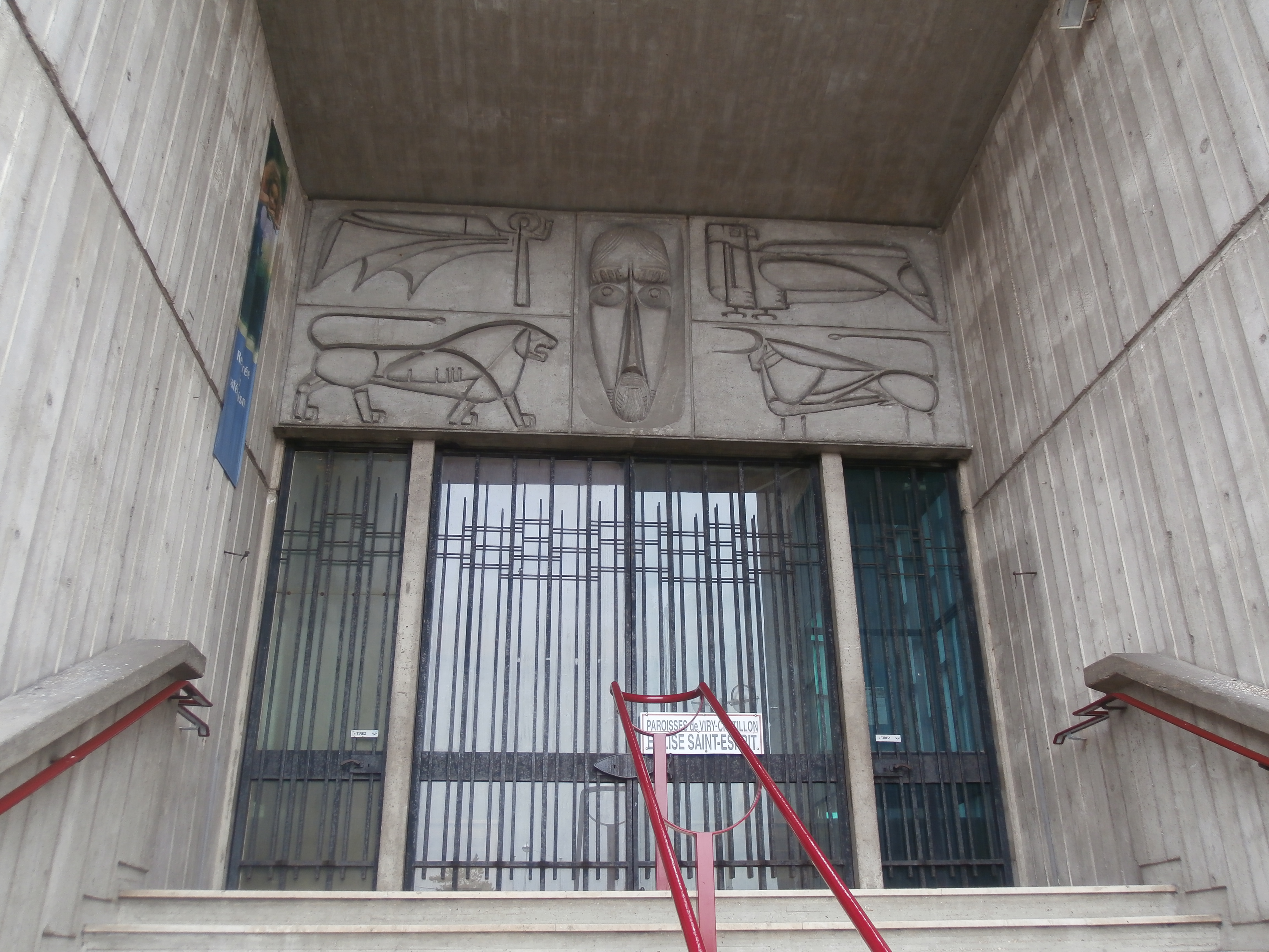 Bas relief du tympan de l'église du Saint-Esprit à Viry-Châtillon